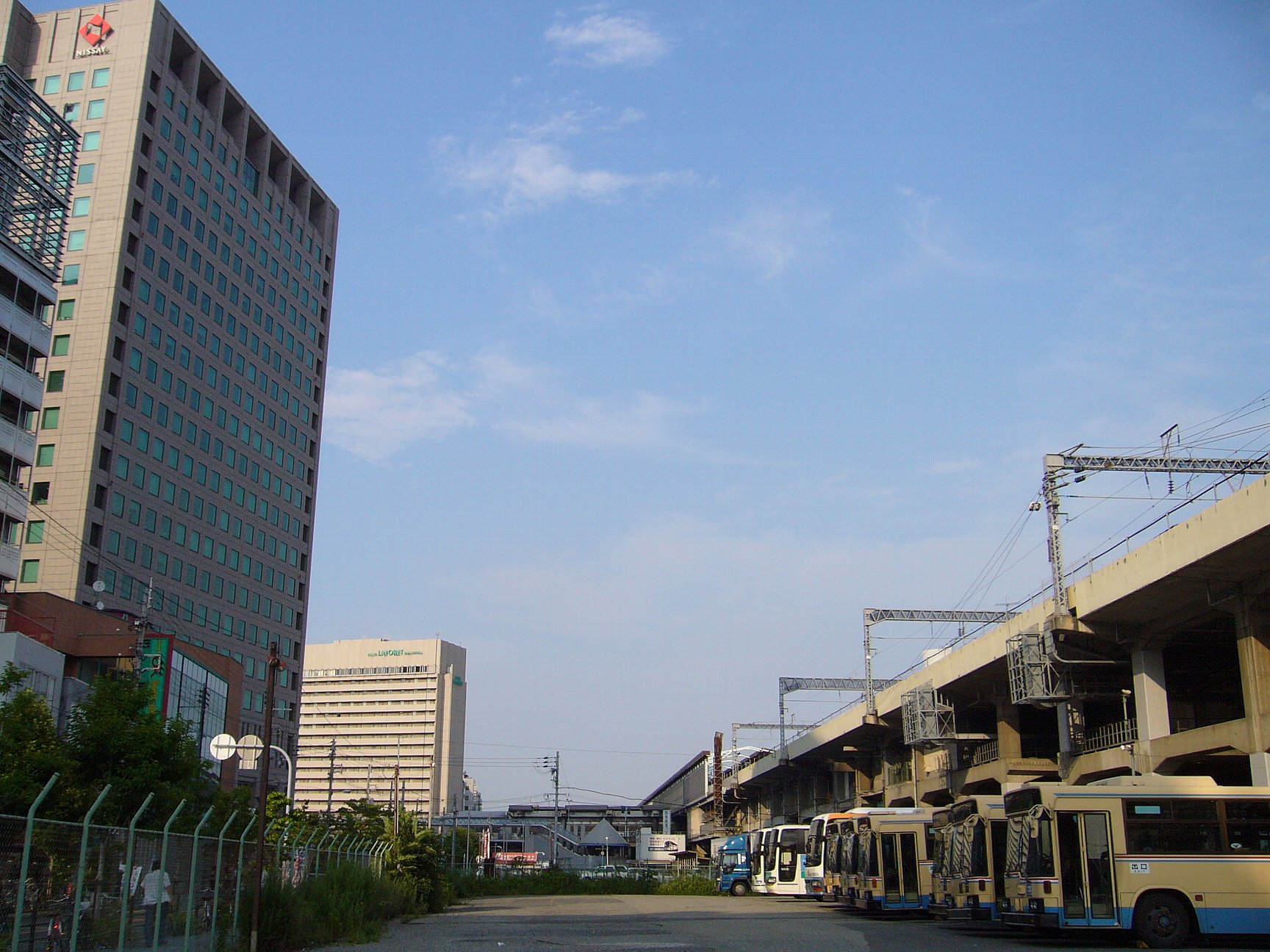 阪急新大阪連絡線の遺構 新大阪駅北西 奥で大阪市営地下鉄御堂筋線新大阪駅があり、屋根上に台のようなものが載っているのが見えるが、ここに新大阪連絡線の駅が設置される予定だった